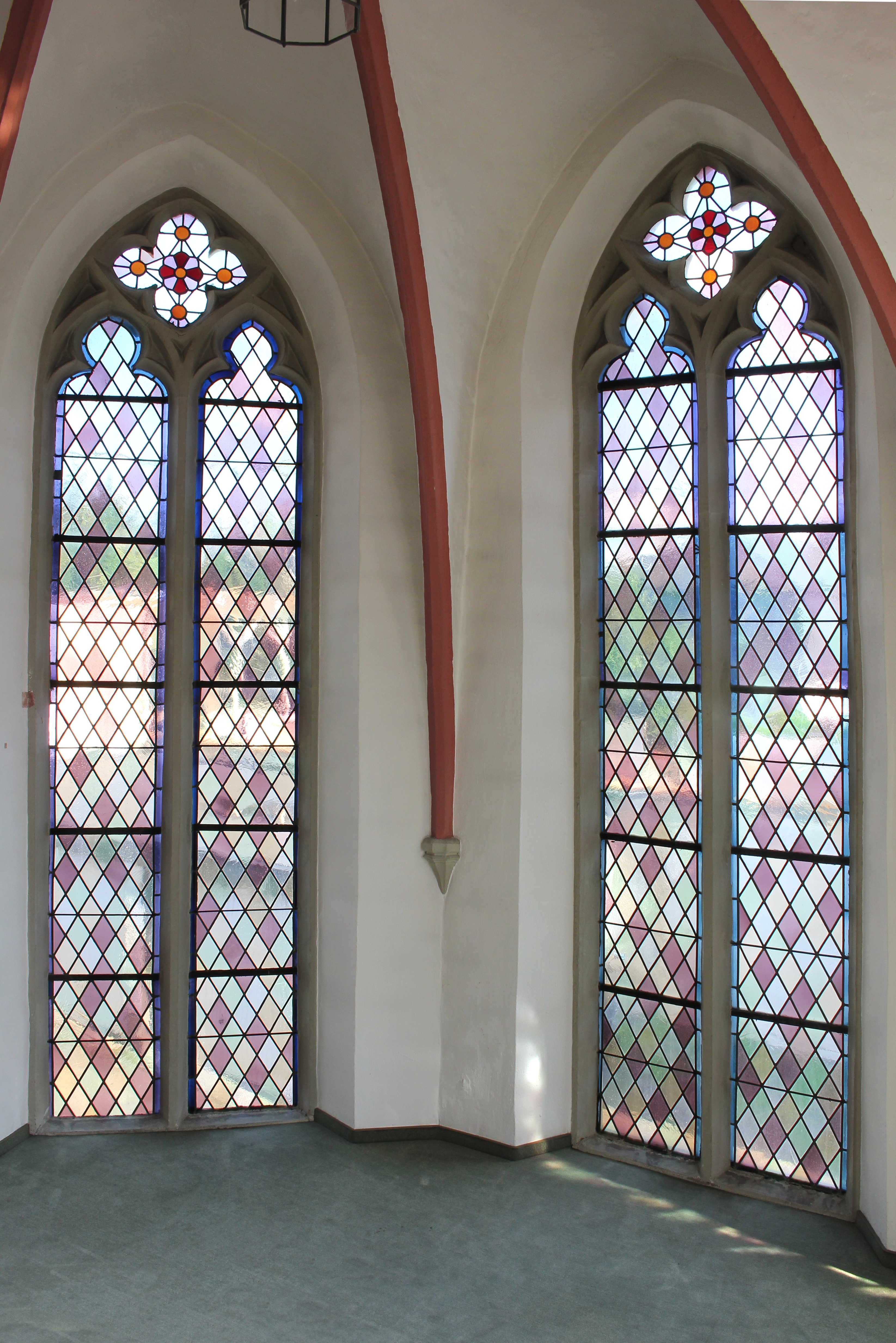 Zwei von fünf Chorfenstern der Alten Kapelle in Mülheim (Mülheim-Kärlich). Der untere Teil des Chorraums ist durch eine Zwischendecke abgetrennt, sodass der Altar hier nicht zu sehen ist.